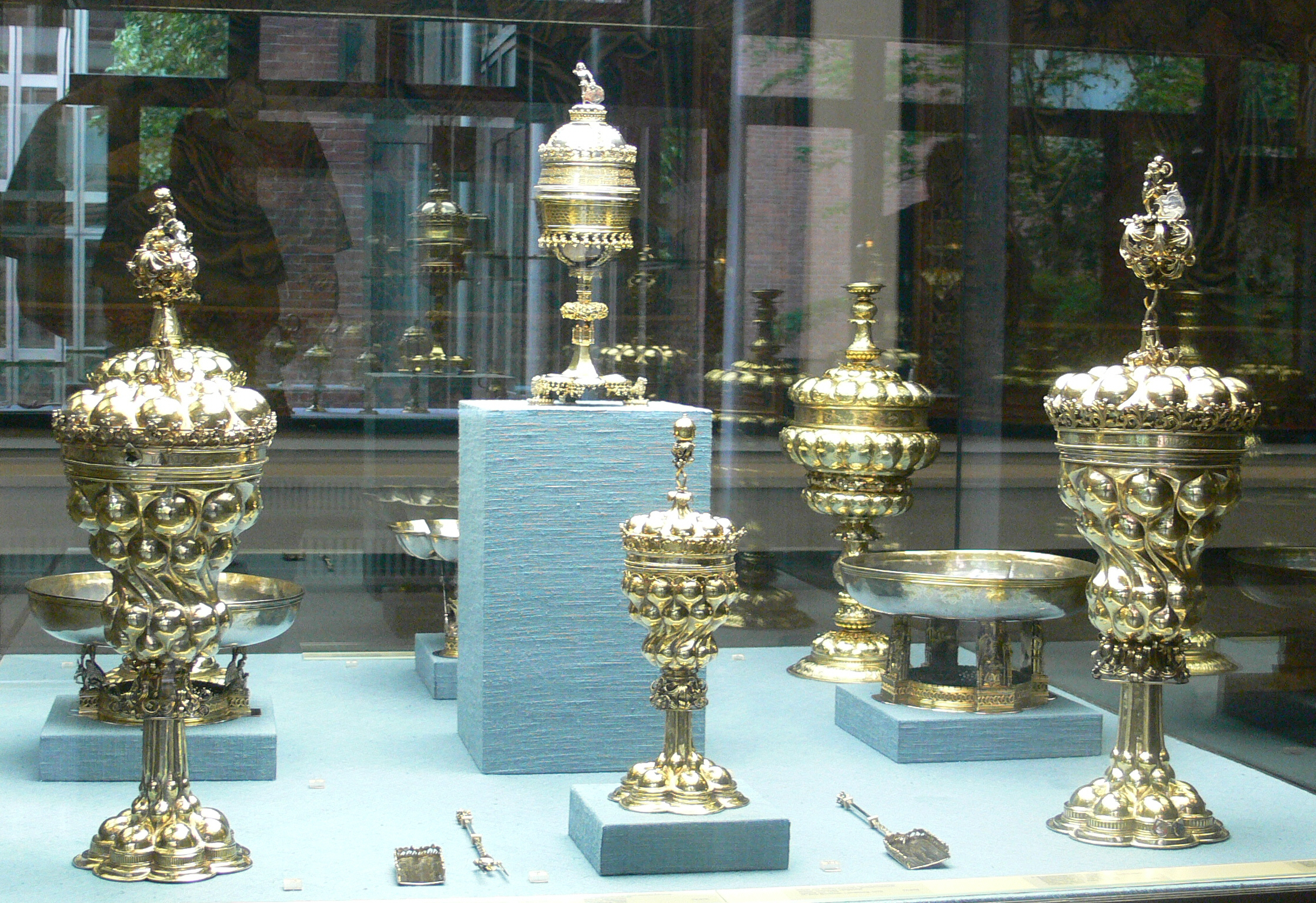 Lüneburger Ratssilber, ehemals im Lüneburger Rathaus, heute im Kunstgewerbemuseum Berlin diverse Pokale